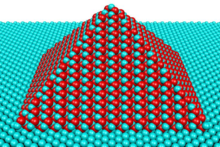 idealisierter (pyramidenförmiger) freistehender Quantenpunkt (quantum dot) aus InAs/GaAs mit Benetzungsschicht (wetting layer)